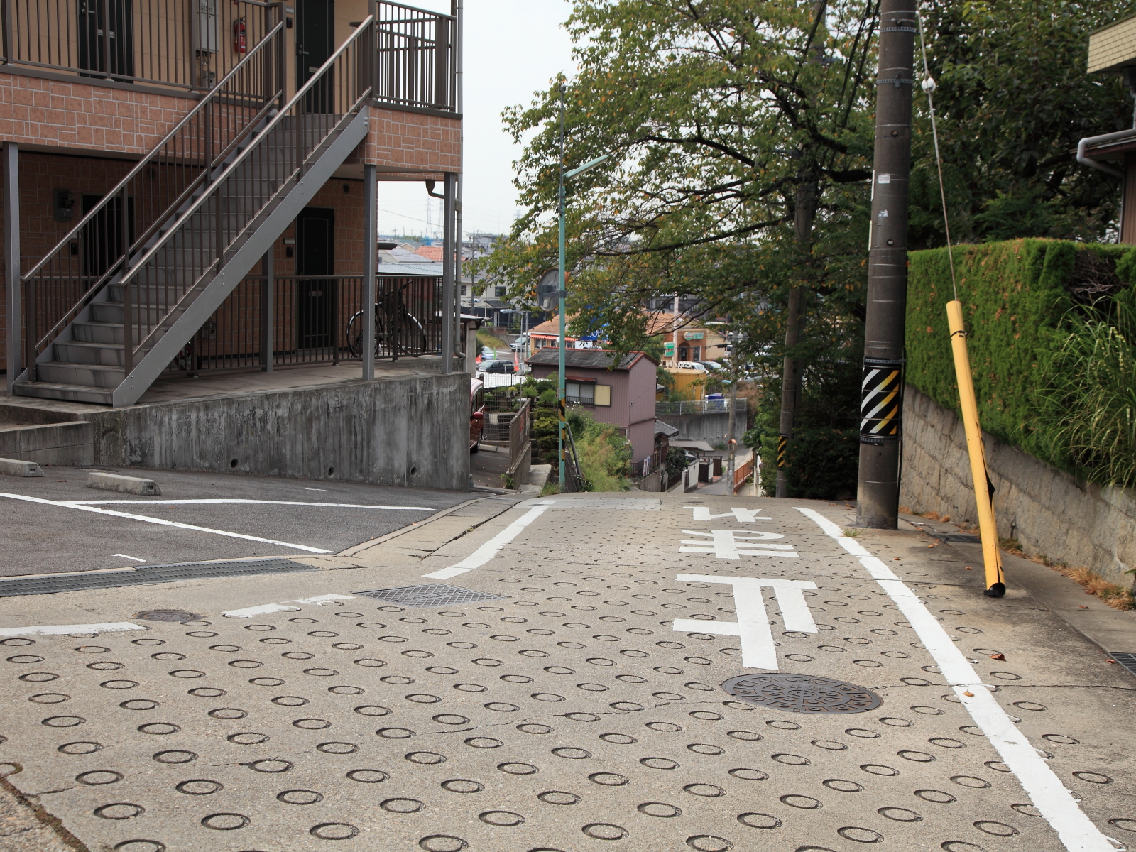 権平谷付近（名古屋市緑区、2012年）